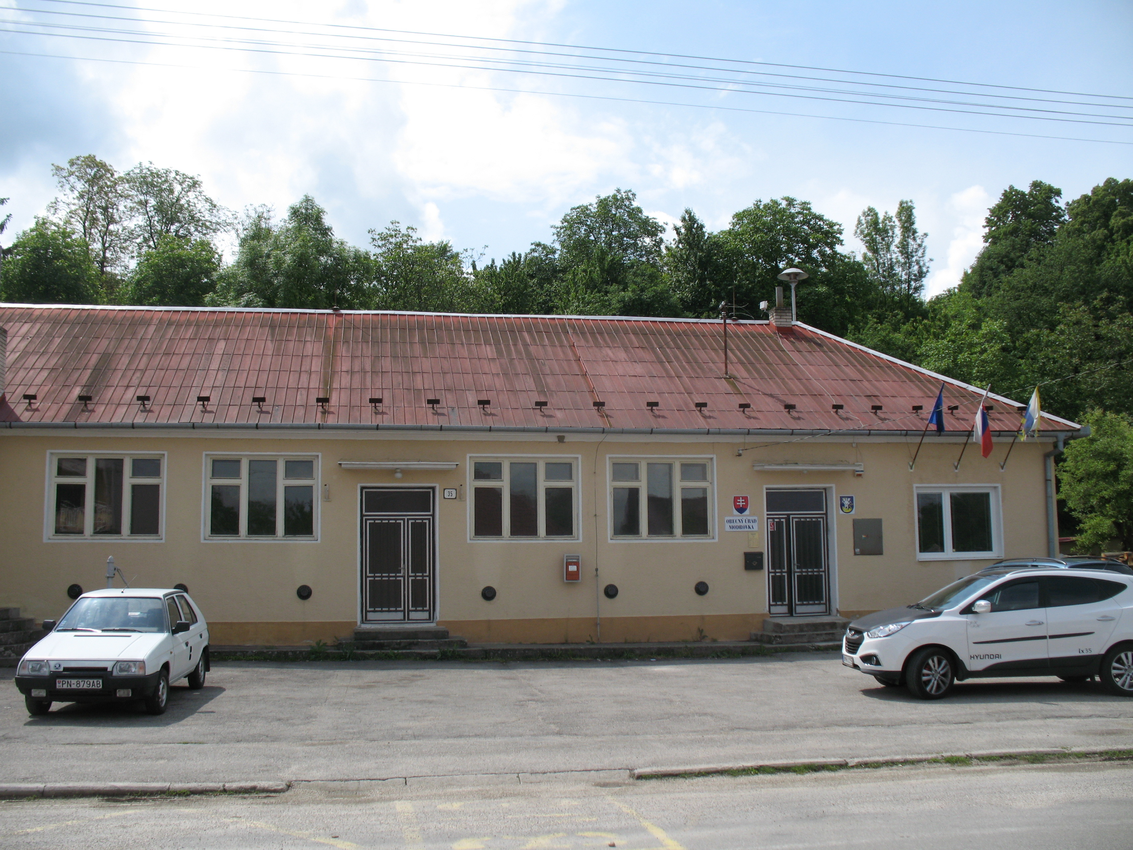 Modrovka